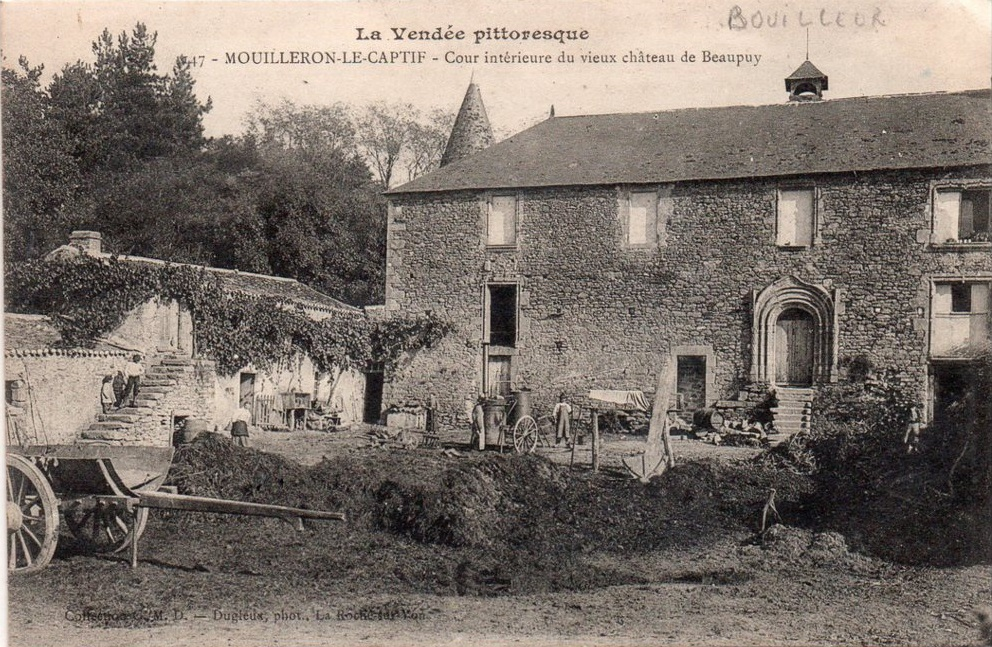 Carte postale, le vieux château de Beaupuy, cour intérieure